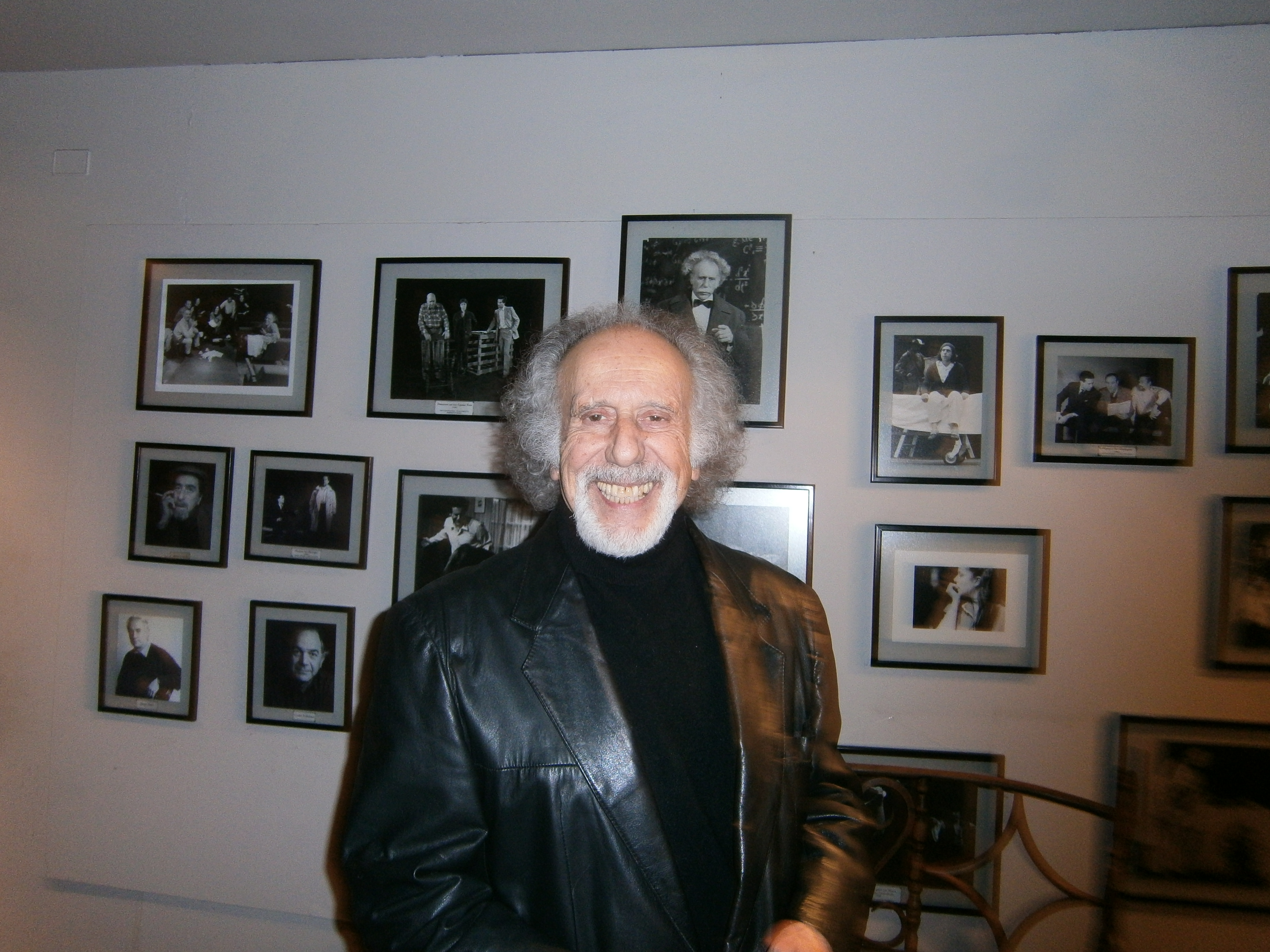 Actor chileno. Fundador del teatro ICTUS